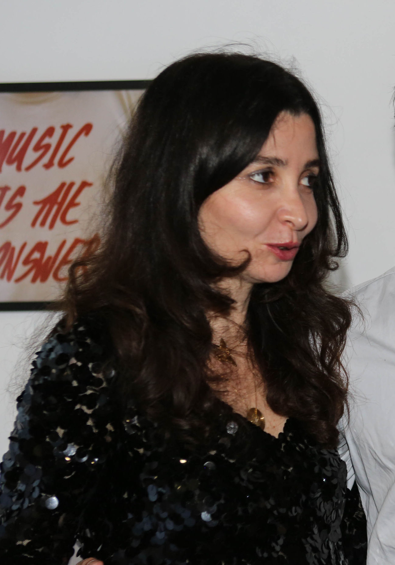 réalisateur